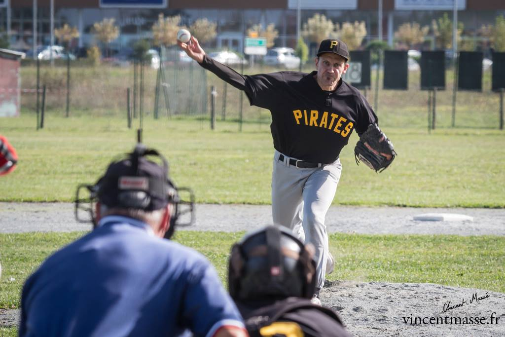 Lanceur biterrois en N2